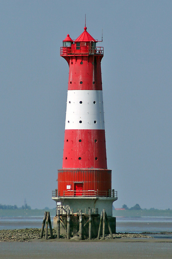 Liichttuerm "Arngast" viru Wilhelmshaven.